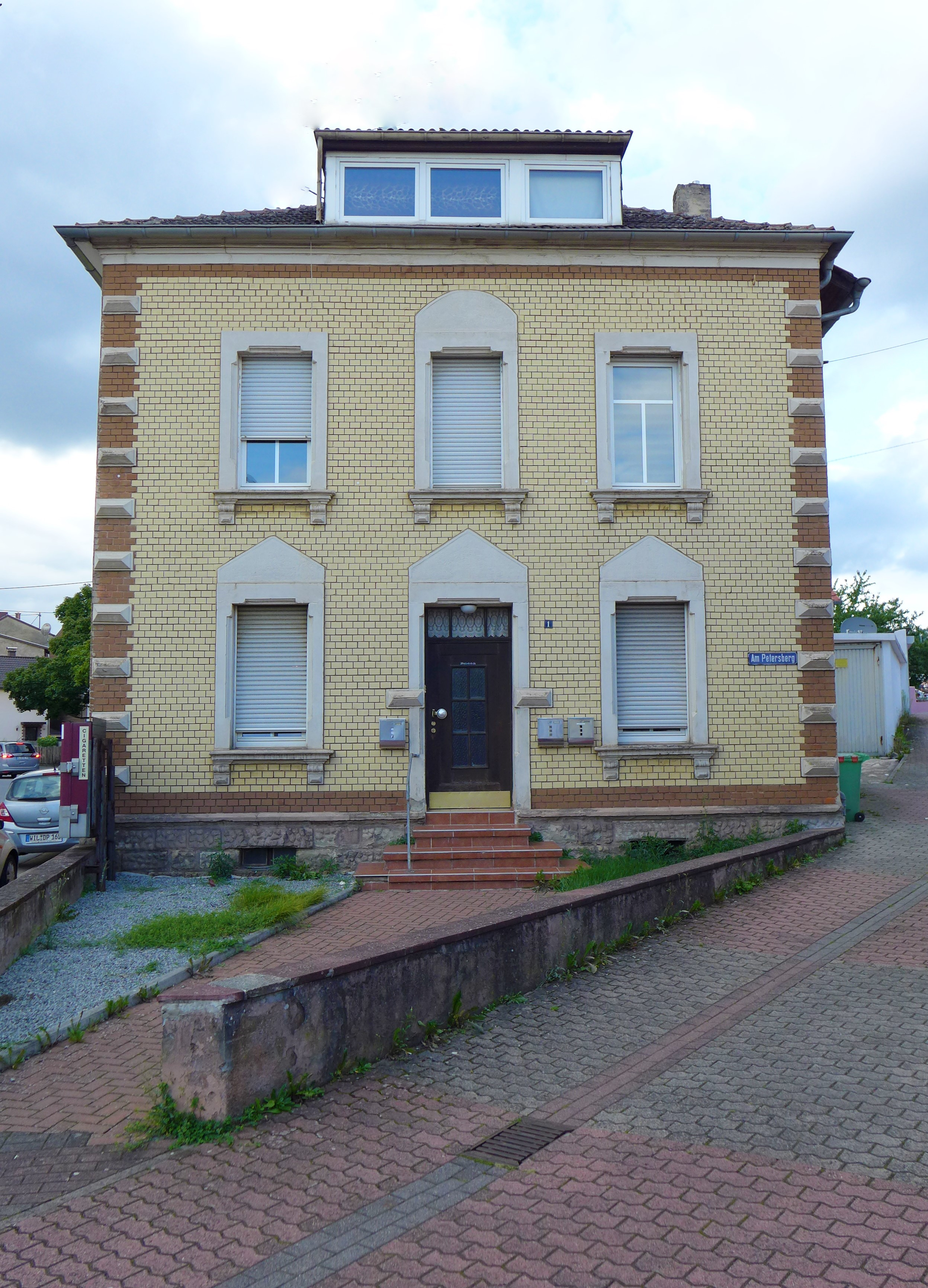 Diefflen, ehemaliges Wohnhaus der jüdischen Familie Weiler am Petersberg